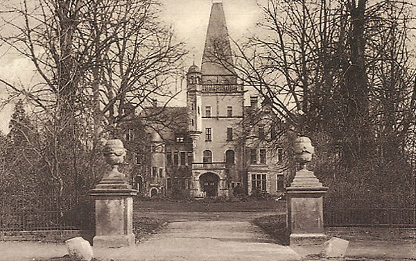 Schloss Tremsbüttel um 1900